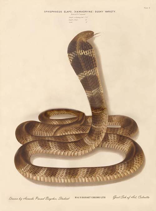 King Cobra